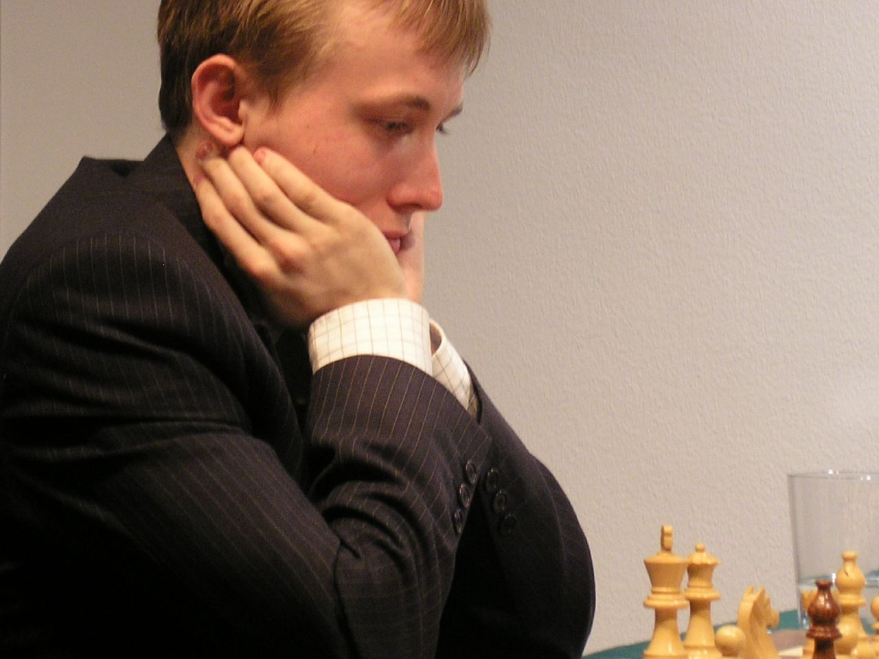 GM Ruslan Ponomariov (Ukraine)